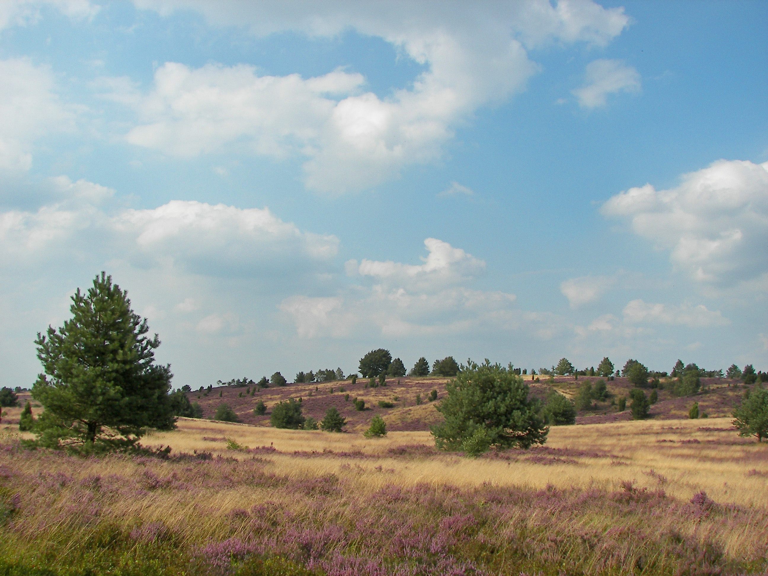 Blick auf den Wilseder Berg